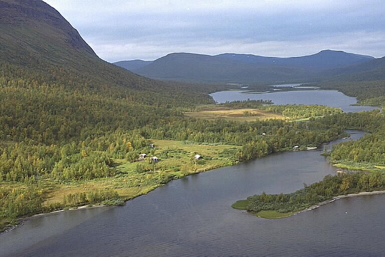 Mattsokudden Motiv: Tjulträsk Nyckelord: Flygbilder, Riksintressen Kategori: Fjällbygd Mattsokudden.